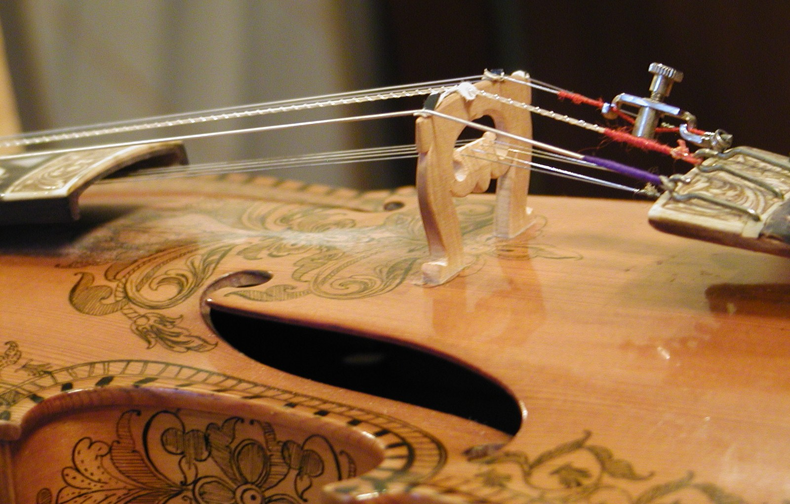 Details einer Hardangerfiedel